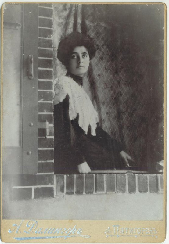 Татьяна Шлецер, 1906 год